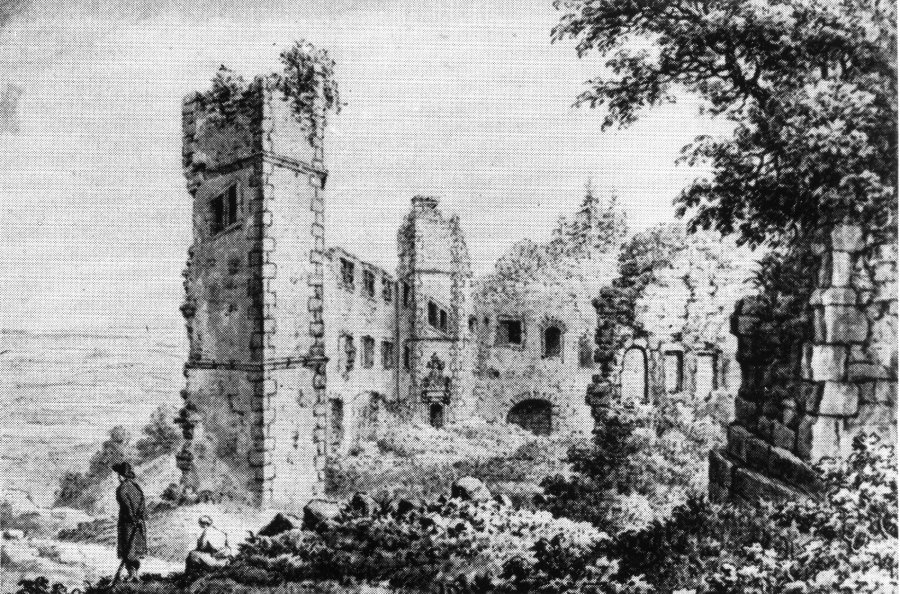 Madenburg, Eberhardsbau (vor dem Einsturz der Hoffassade), Federzeichnung im Hist. Mus. d. Pfalz, Speyer